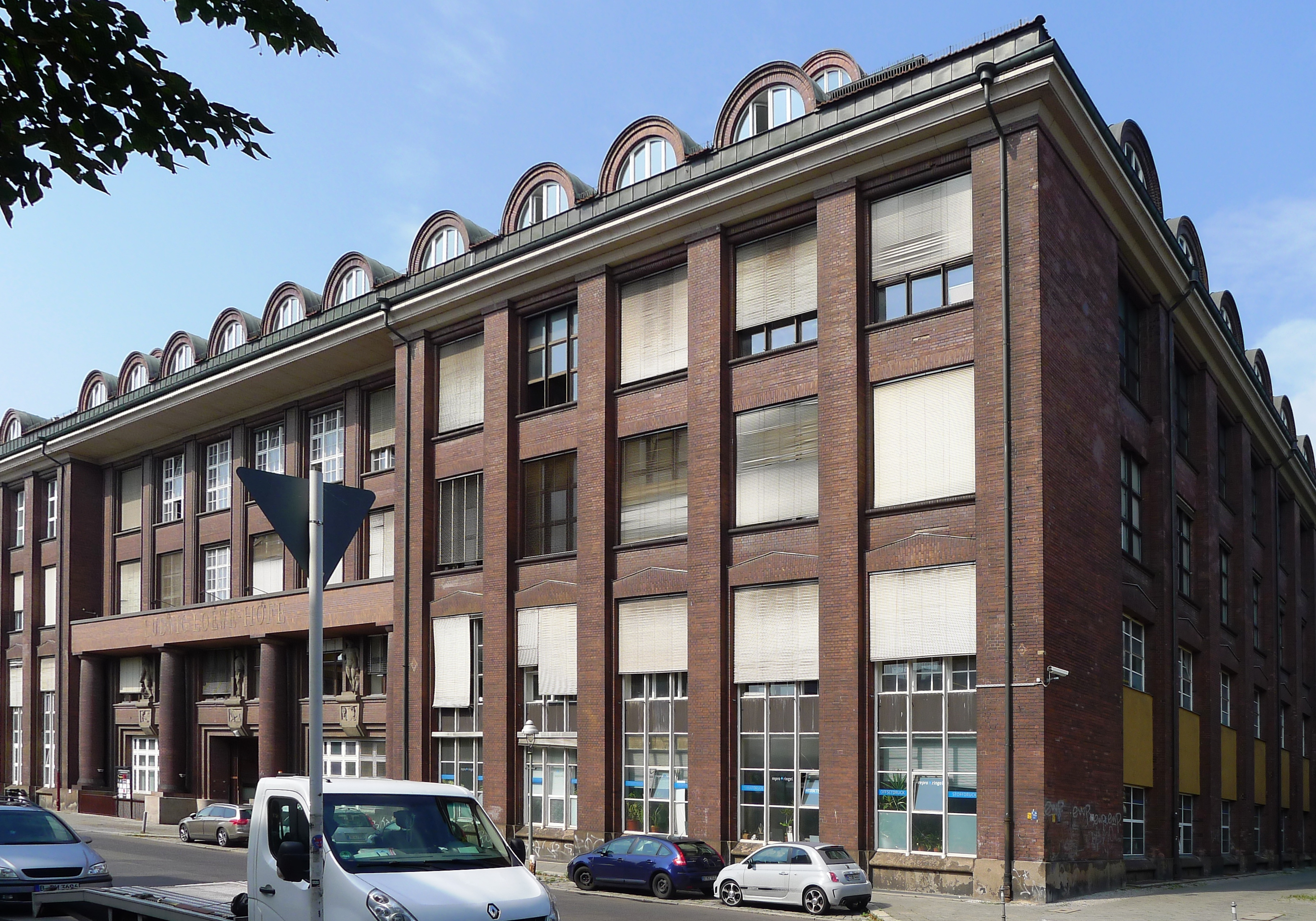 Fabrik